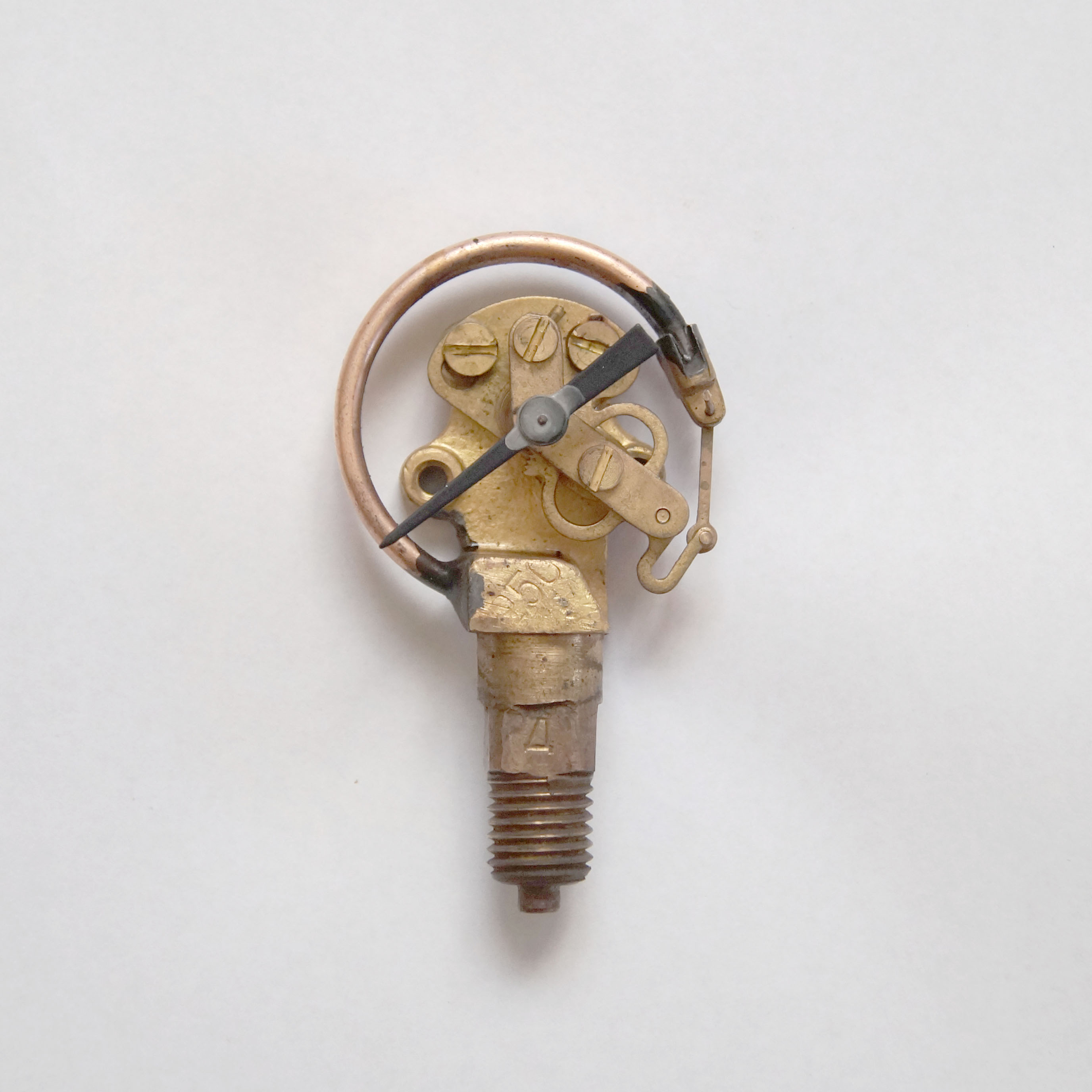 Mehaaniline manomeeter lahtivõetult